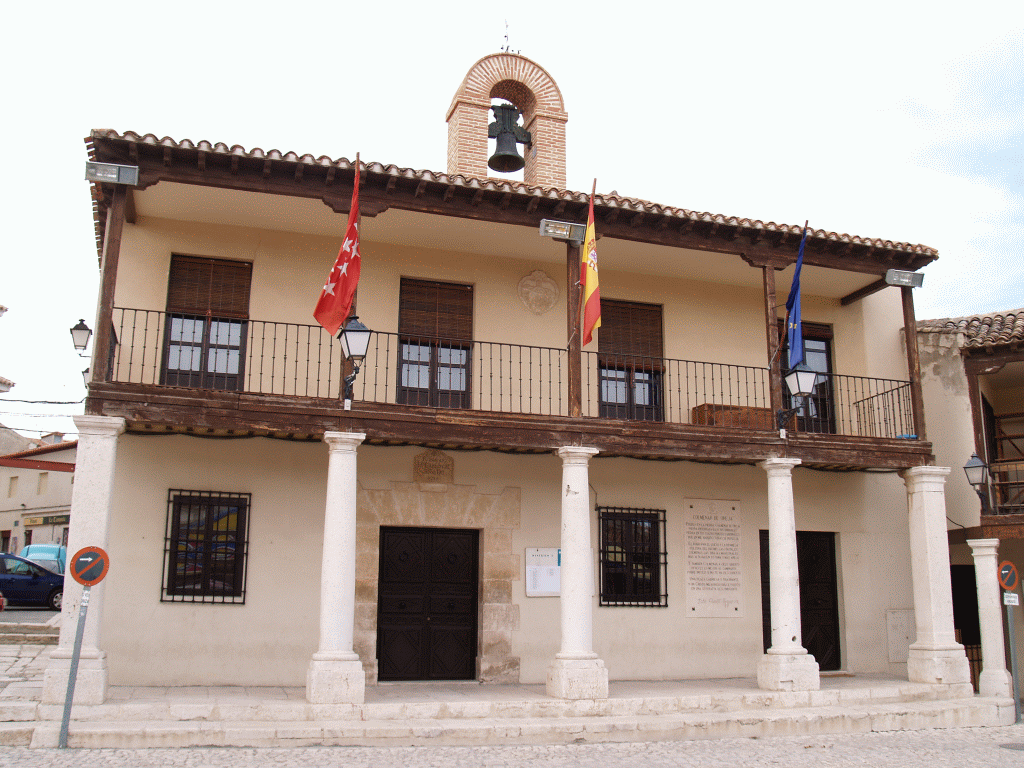 Hiszpania, Madryt, Colmenar de Oreja, Ratusz, (Ayuntamiento) Plaza Mayor